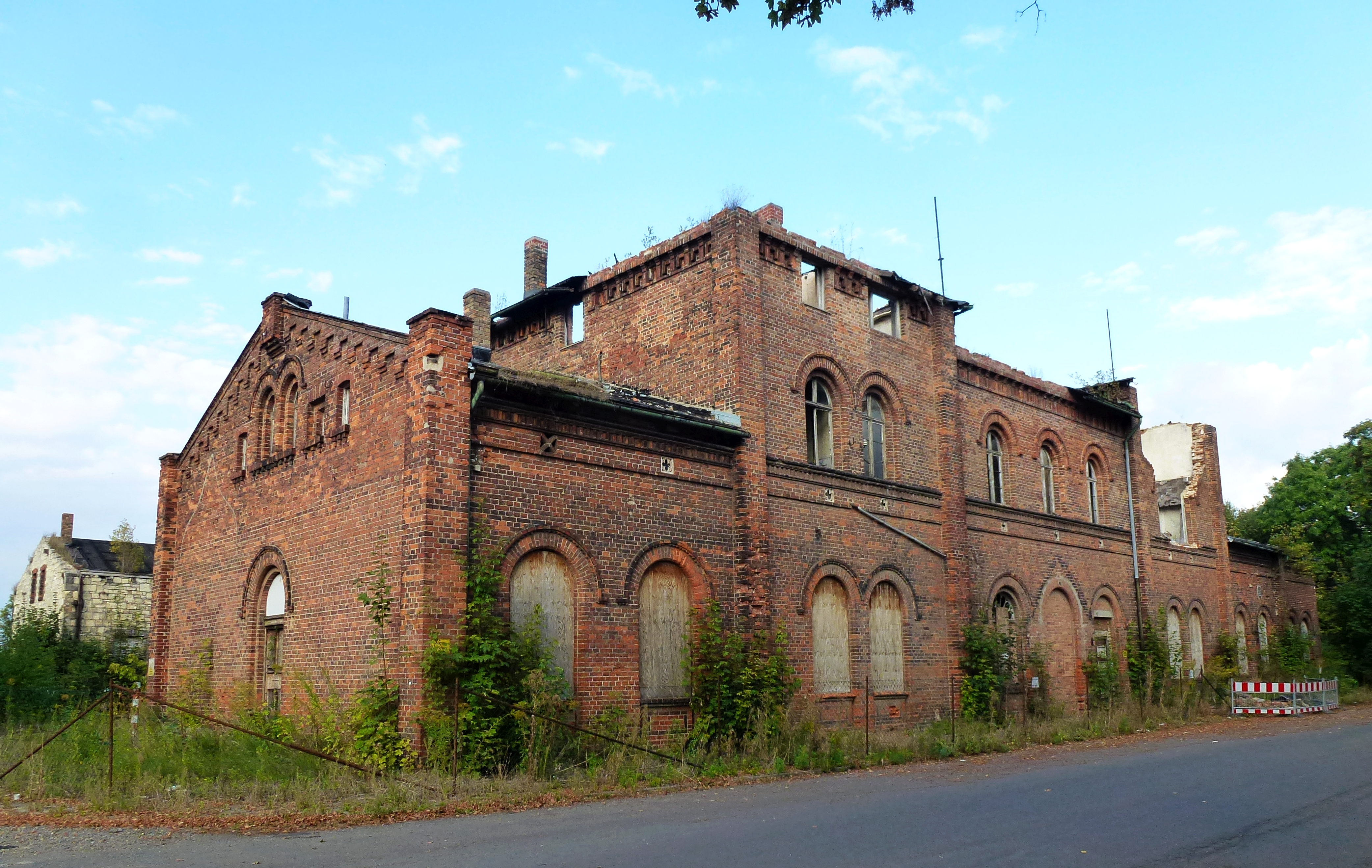 Ehemaliges Bahnhofsgebäude Ballenstedt-Ost